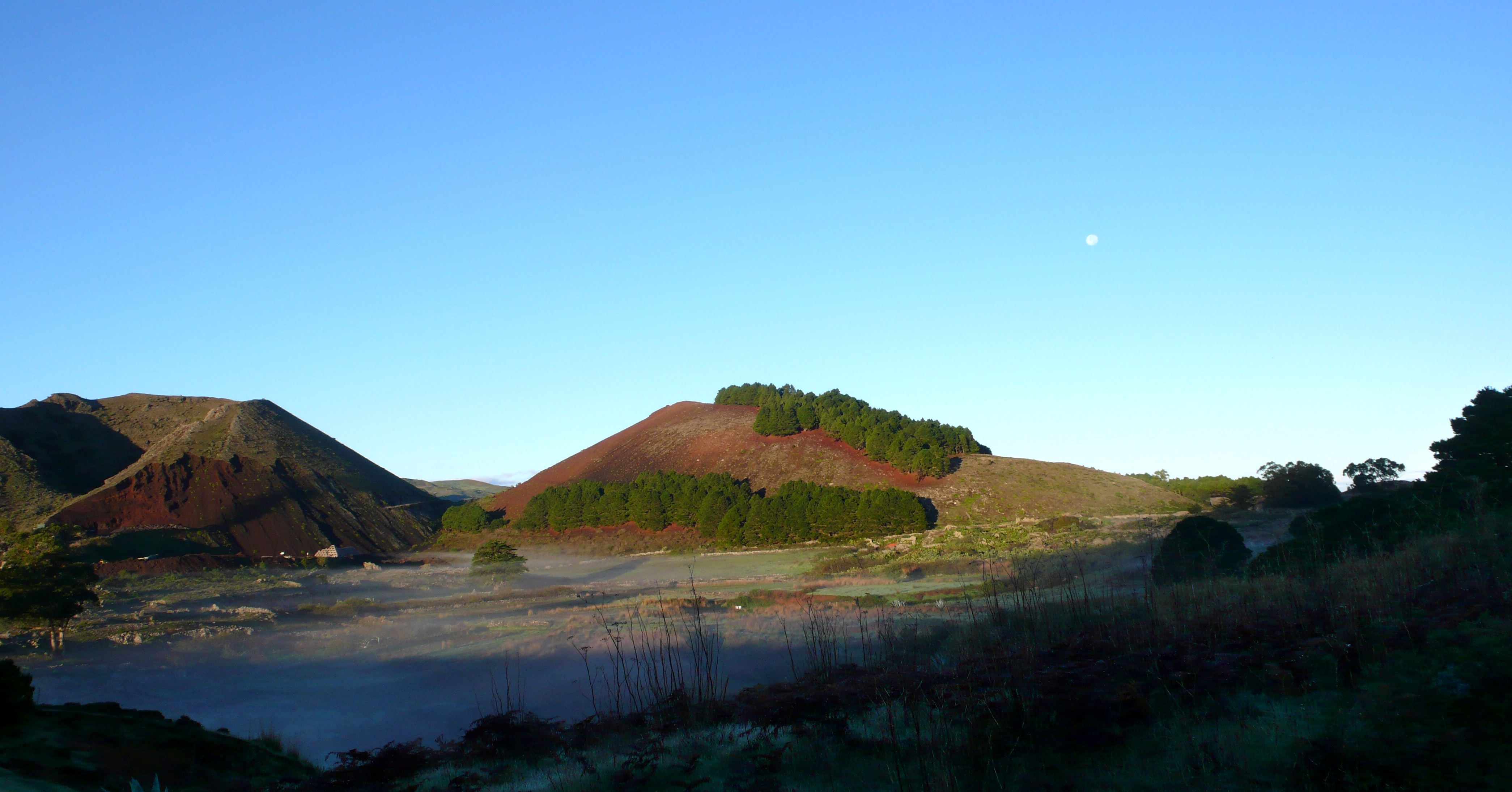 Paisaje cerca de San Andrés (El Hierro)